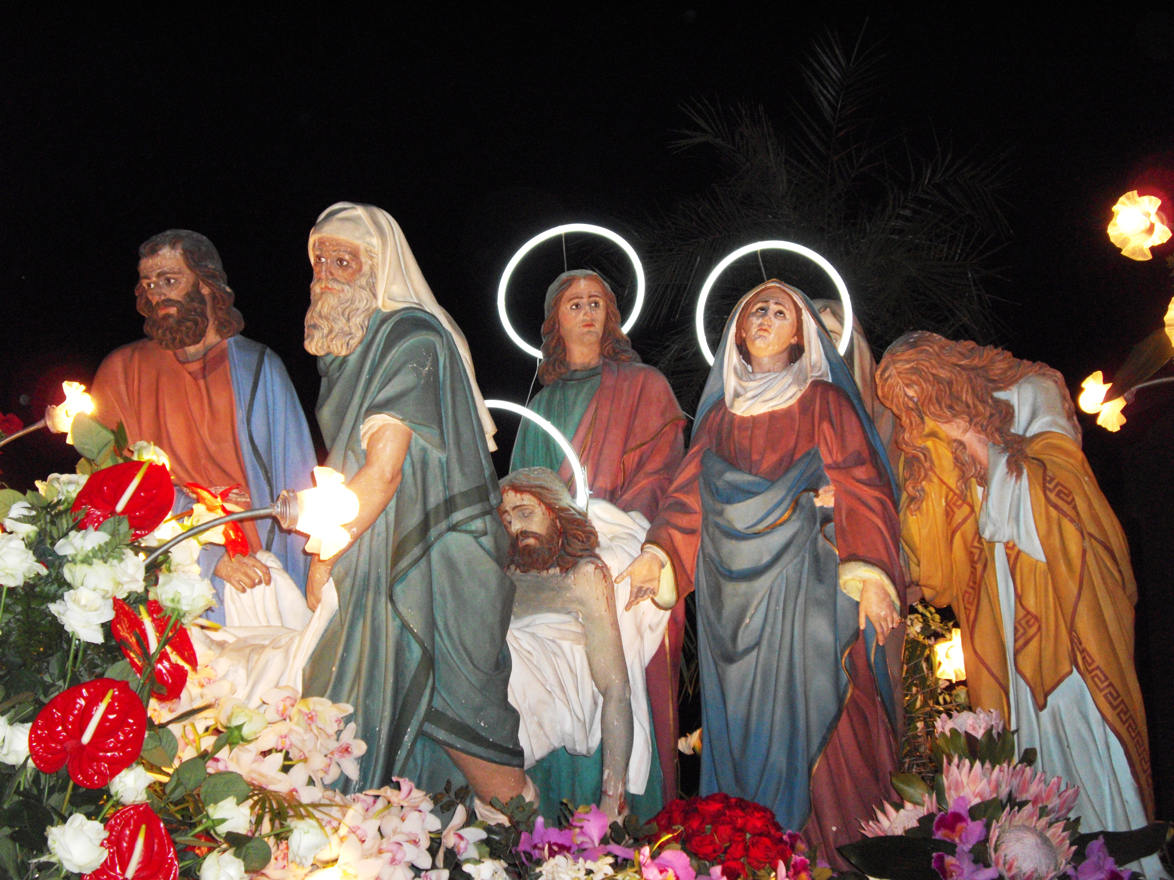 Pasqua 2009